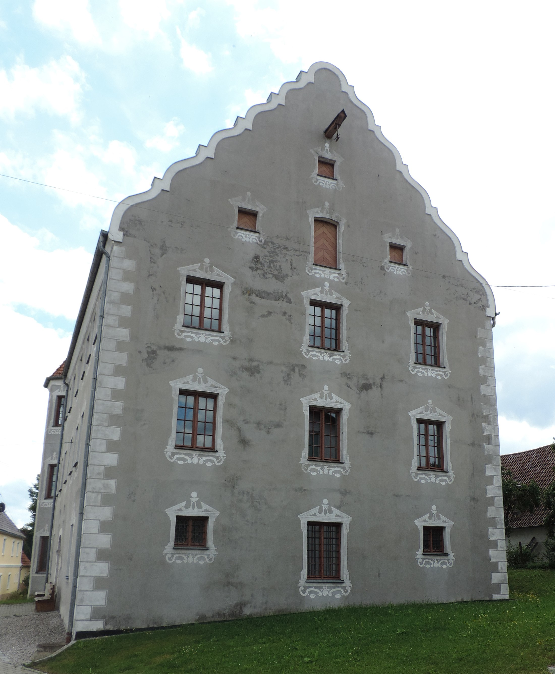 Schloss Ballmersthofen